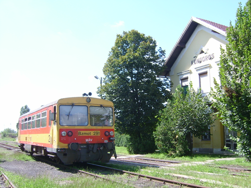 A kondorosi vasútállomás épülete Bzmot típusú motorkocsival. The railway station of Kondoros with Bzmot, Hungary.